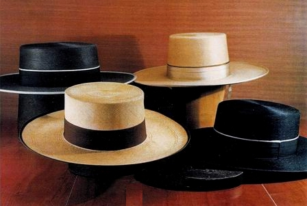 Sombrero cordobés o de ala ancha. Spanish tipicall hut